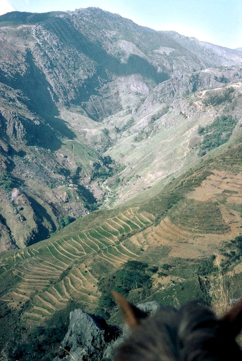 Foto tirada de cima do cavalo.Paisagem característica da região de Atsabe